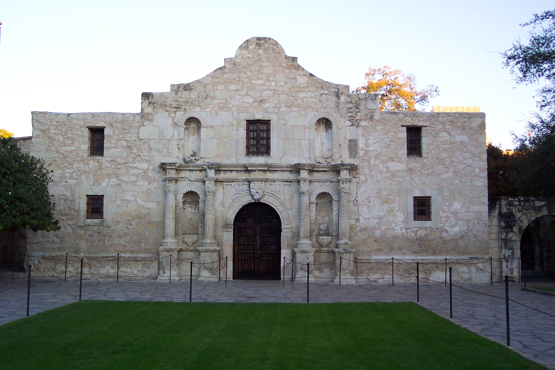 Chapelle de la mission San Antonio également nommée Fort Alamo, à San Antonio, Texas